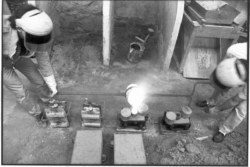 Foto pessoal